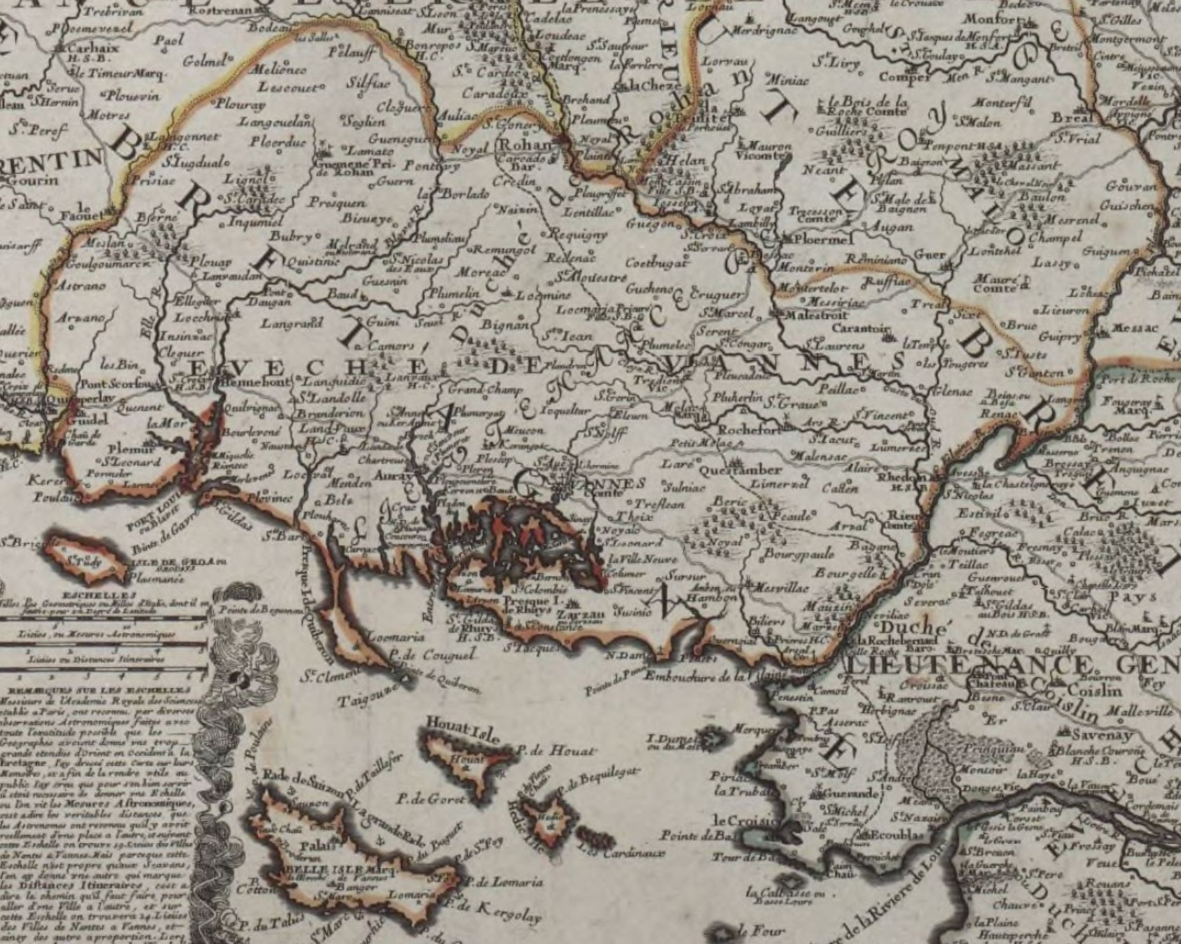 L'évêché de Vannes ( section de la carte de la province de Bretagne divisée en grandes parties de Jean-Baptiste Nolin éditée en 1695)